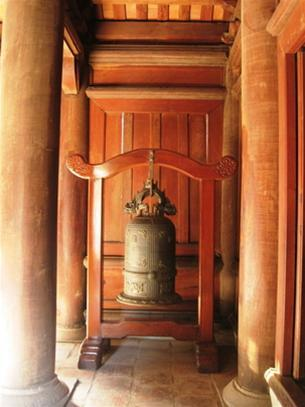 Nguyễn Nghiễm, Vũ Miên...đúc Bích Ung đại chuông năm Cảnh Hưng thứ 29 (1768)